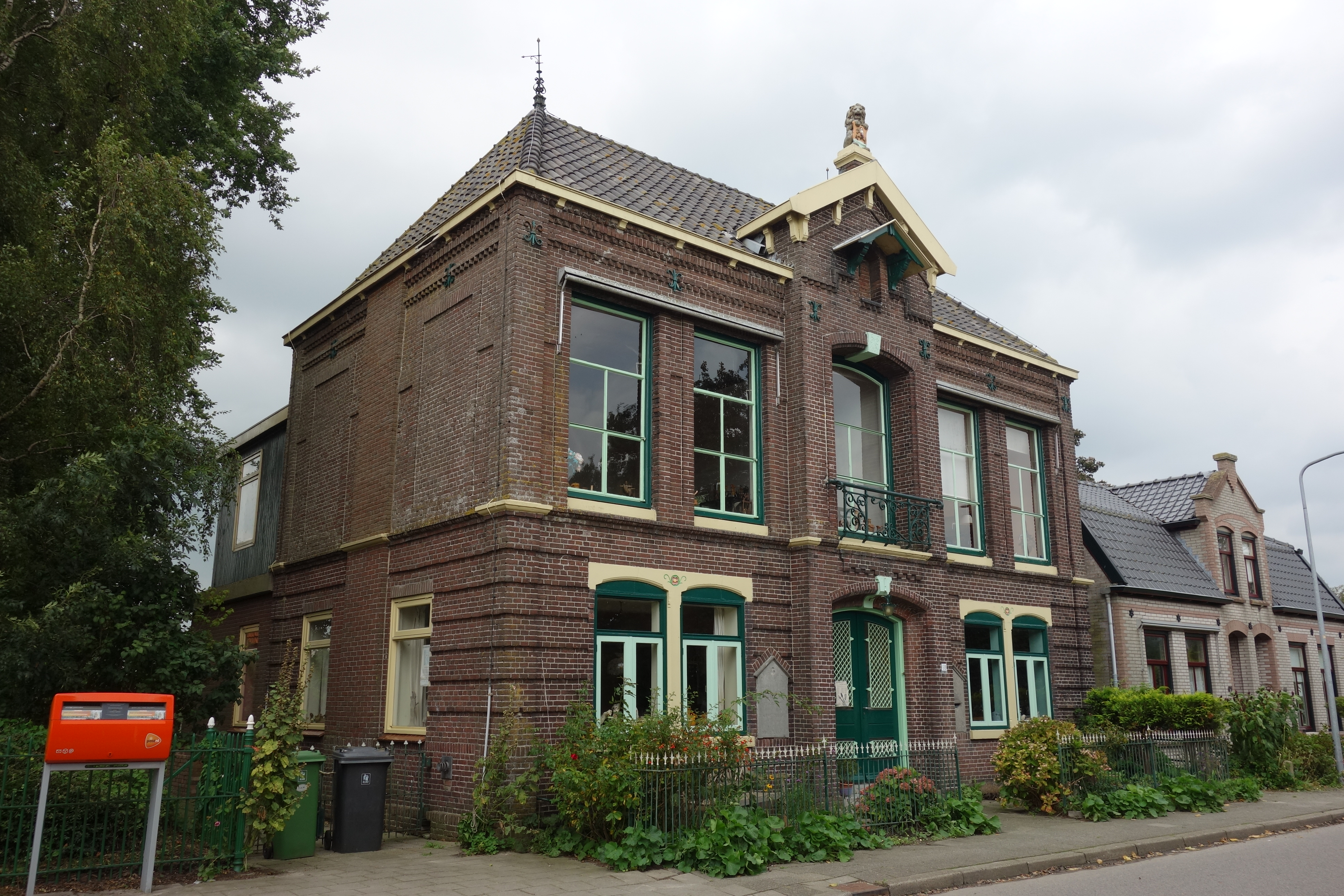 Voormalig raadhuis van het dorp Grosthuizen.